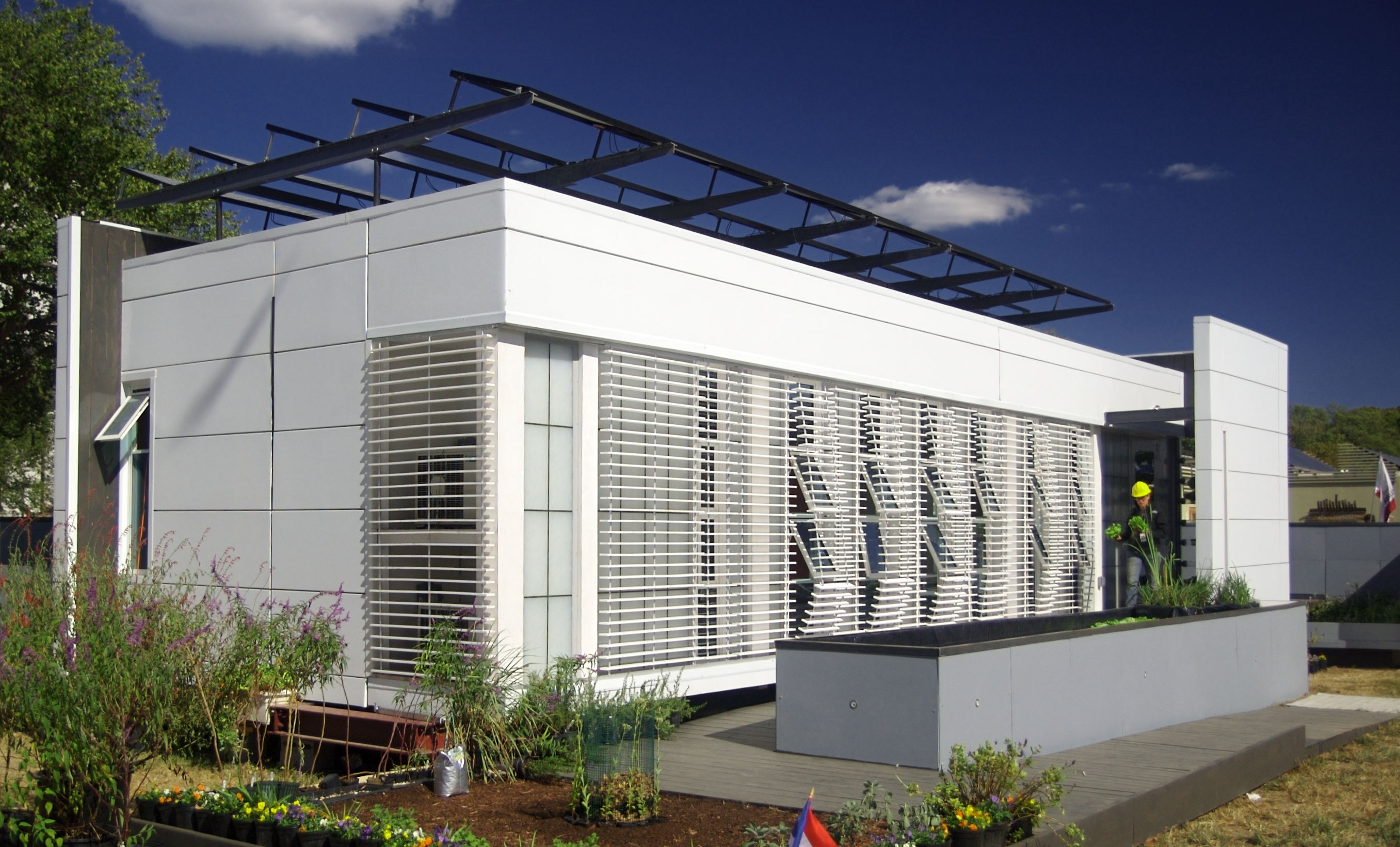 Solar Decathlon 2007, Universidad de Puerto Rico house.